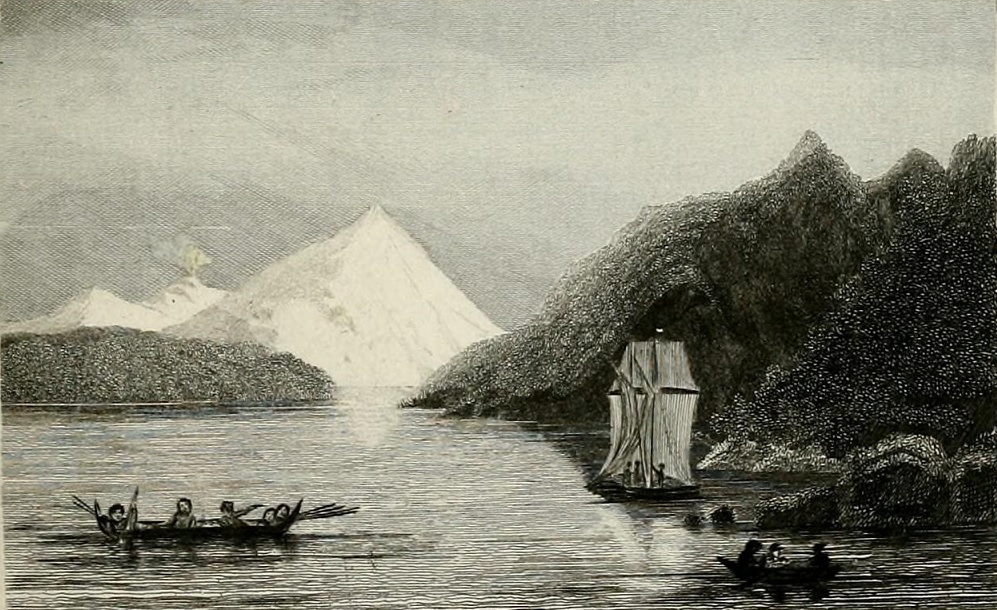 Estrecho de Magallanes 1827 durante la expedición del almirante Phillip Parker King, tomado del libro "Narrative of the surveying voyages of His Majesty's Ships Adventure and Beagle between the years 1826 and 1836, describing their examination of the southern shores of South America, and the Beagle's circumnavigation of the globe. Proceedings of the first expedition, 1826-30, under the command of Captain P. Parker King, R.N., F.R.S. London: Henry Colburn"